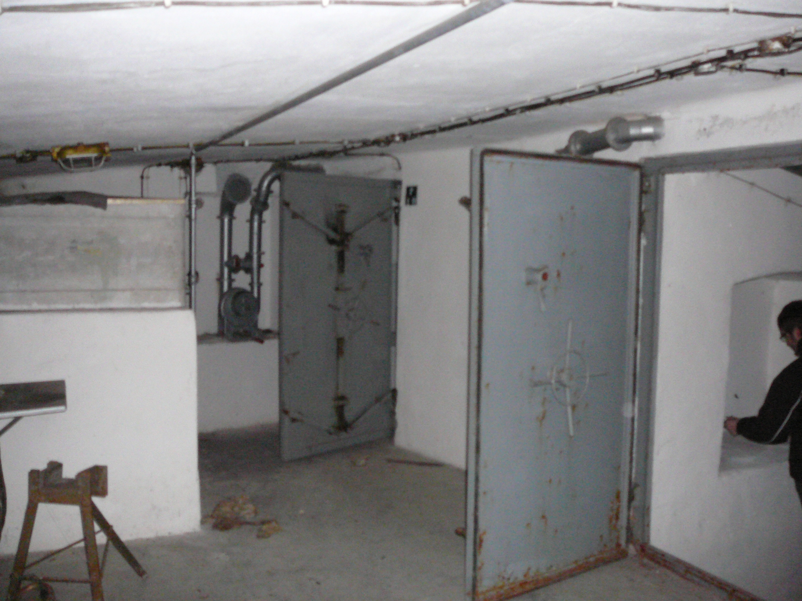 Opera_7, Tenne-Novale